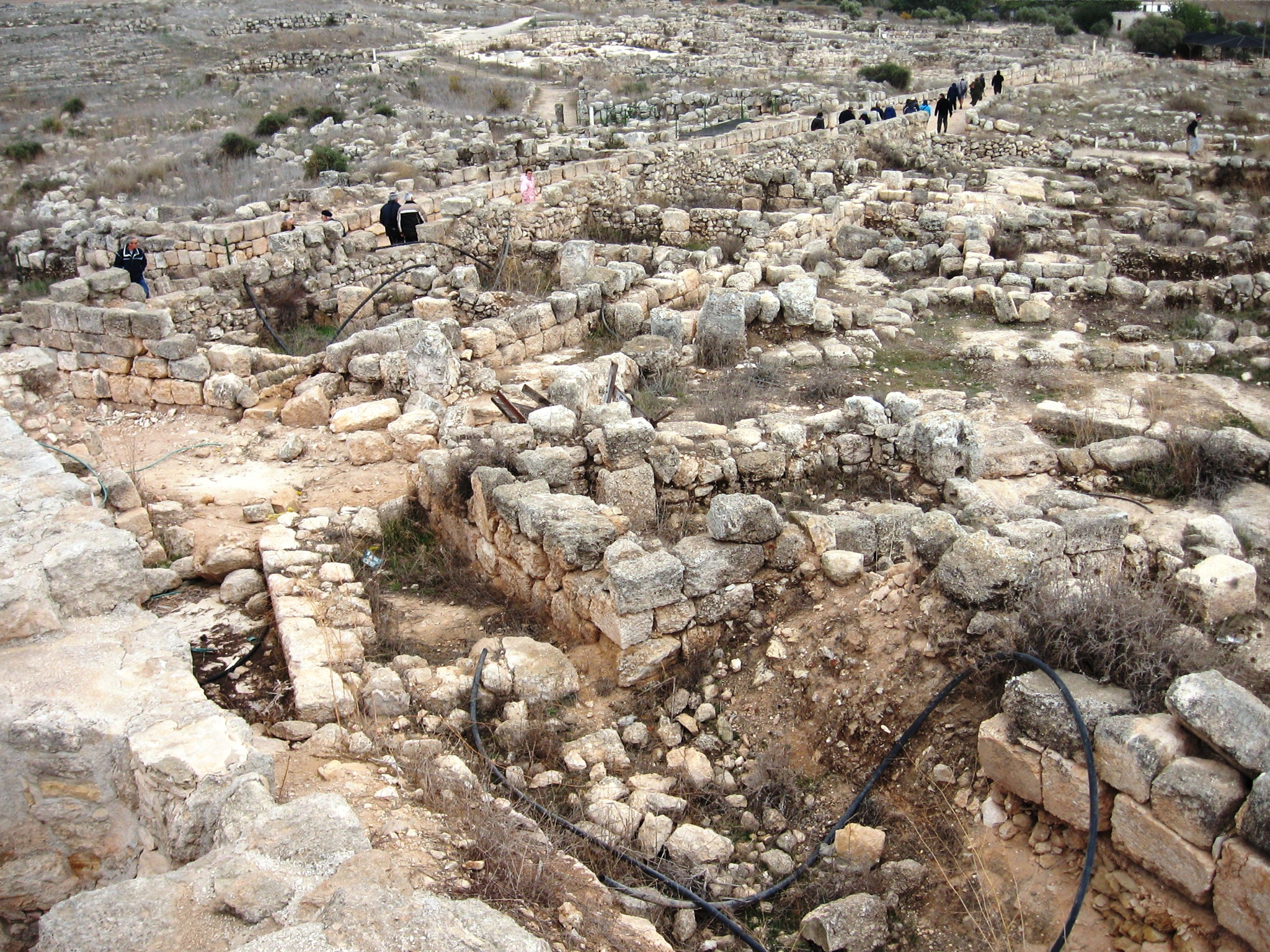 Susia_synagoque